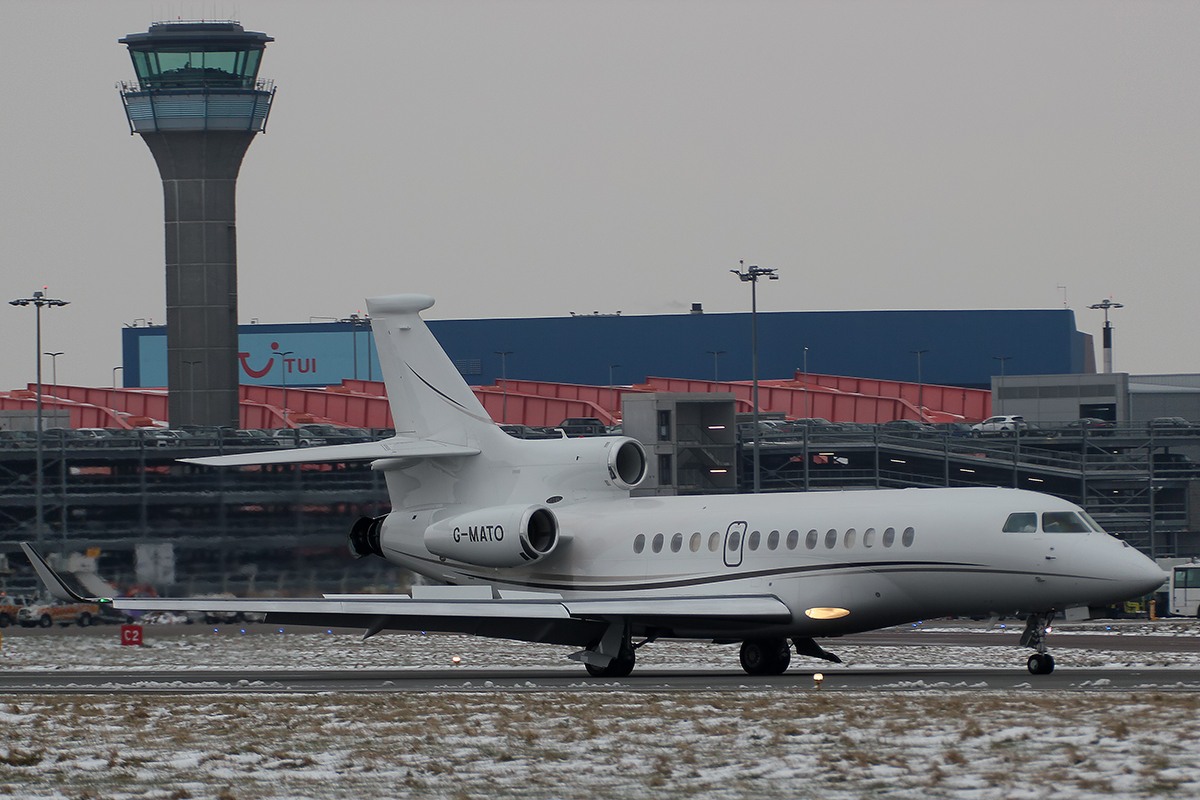 G-MATO Dassault Falcon 7X @ Luton 18/03/2018